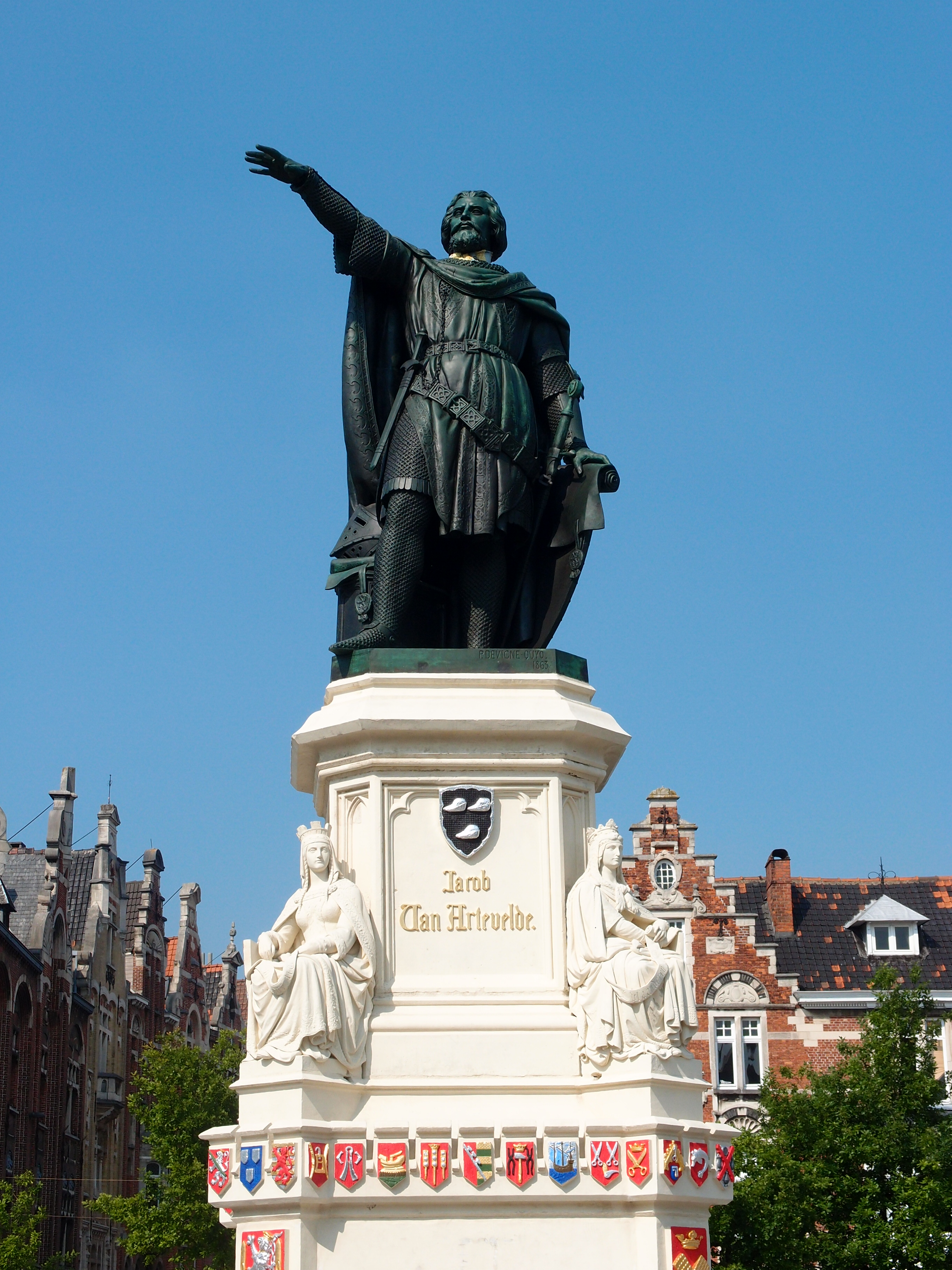 Denkmal (Teilansicht) für Jacob van Artevelde in Gent (Belgien) Datum: 08.06.2014 Urheber: M. Pfeiffer alias Benutzer:Gordito1869 Quelle: Privates Fotoarchiv des Urhebers